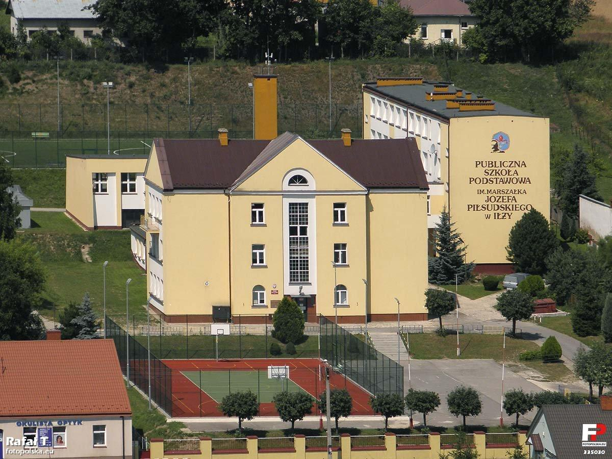 Budynki szkoły podstawowej w Iłży.